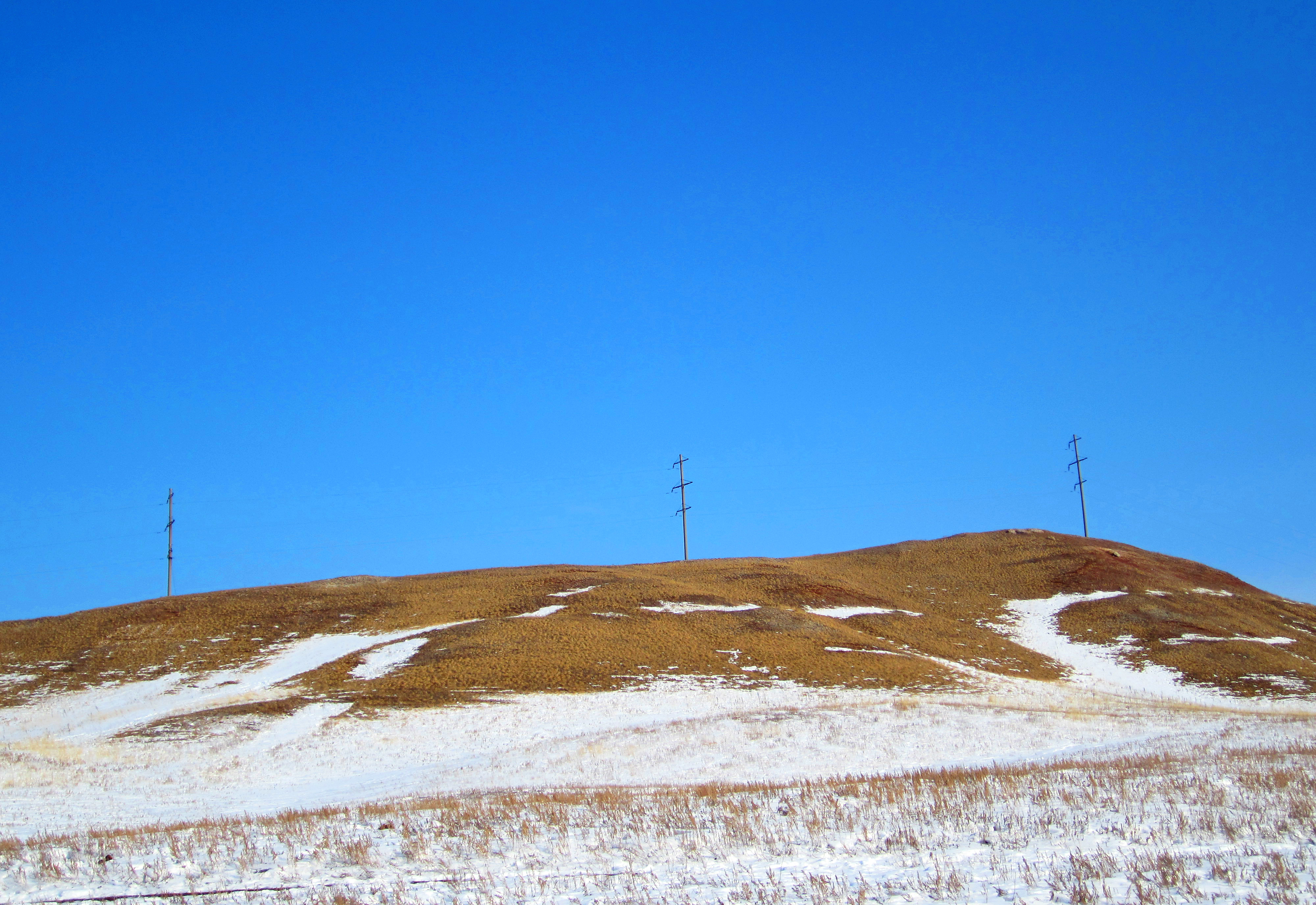 Гора возле Термень-Елги, Ишимбай, Башкортостан